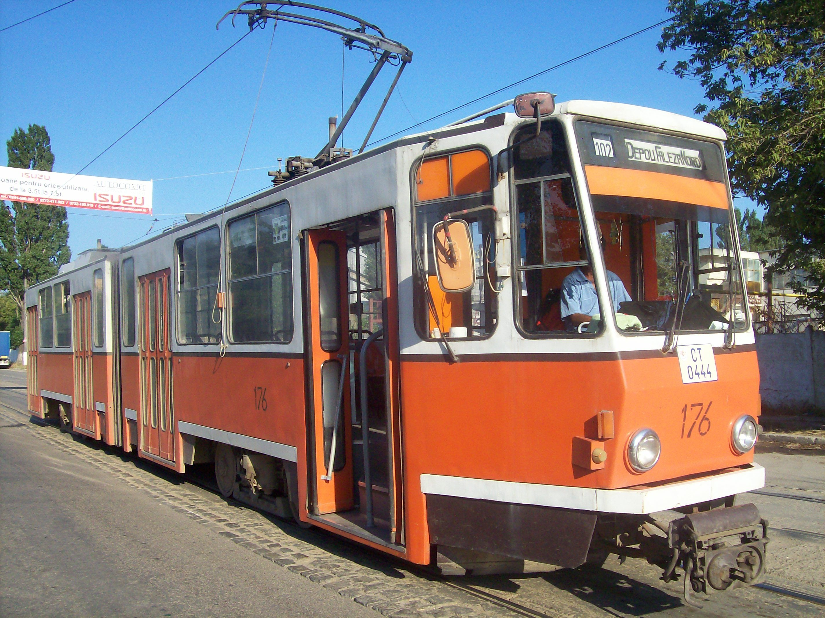 Tramvai din Berlin, Germania pe linia de tramvai Constănțeană 102 (Depou-Faleză Nord), la City Park Mall of Constanta.